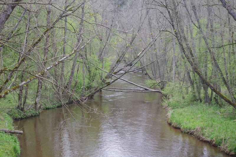 Siesarties upės pradžia ties Siesarčio ežeru